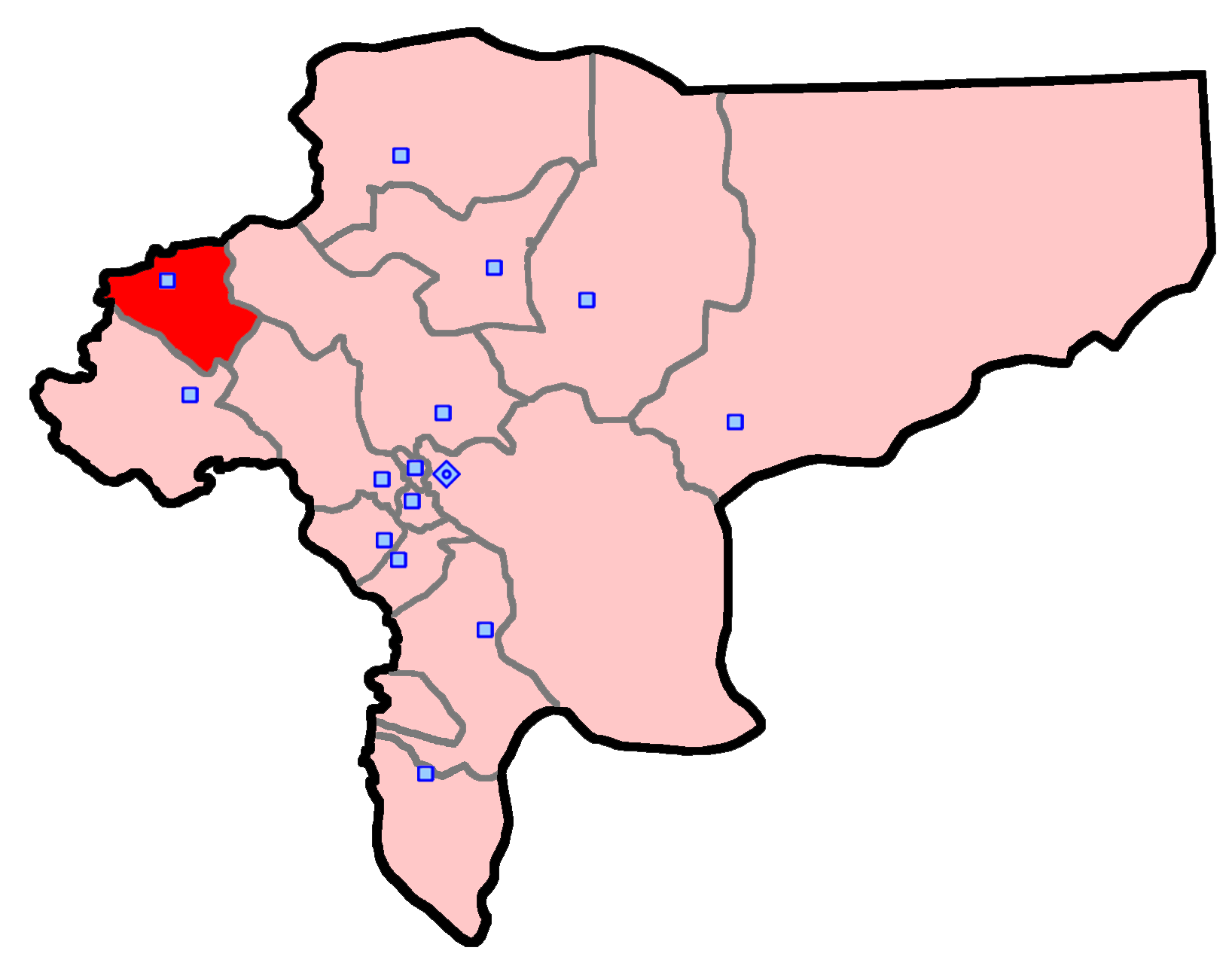 حوزهٔ انتخاباتی گلپایگان و خوانسار برای انتخابات مجلس شورای اسلامی